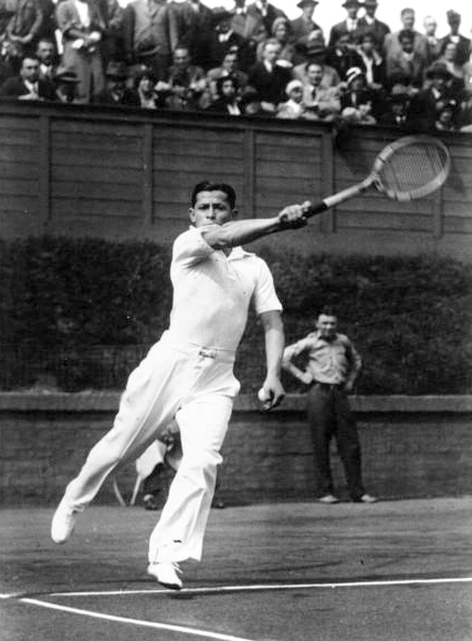 Československý prvorepublikový tenista Ladislav Hecht.